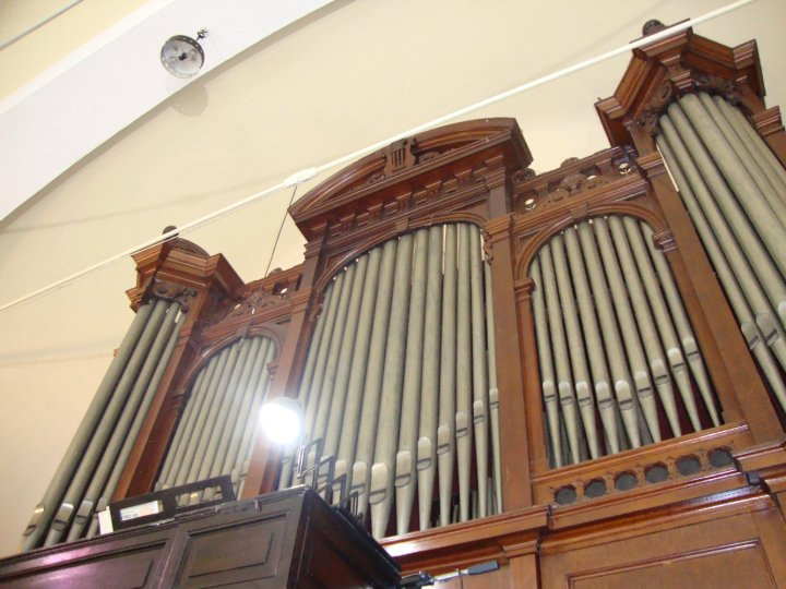 Organo Cabaille = coll de La Basilica Santa Teresa (Caracas - Venezuela)